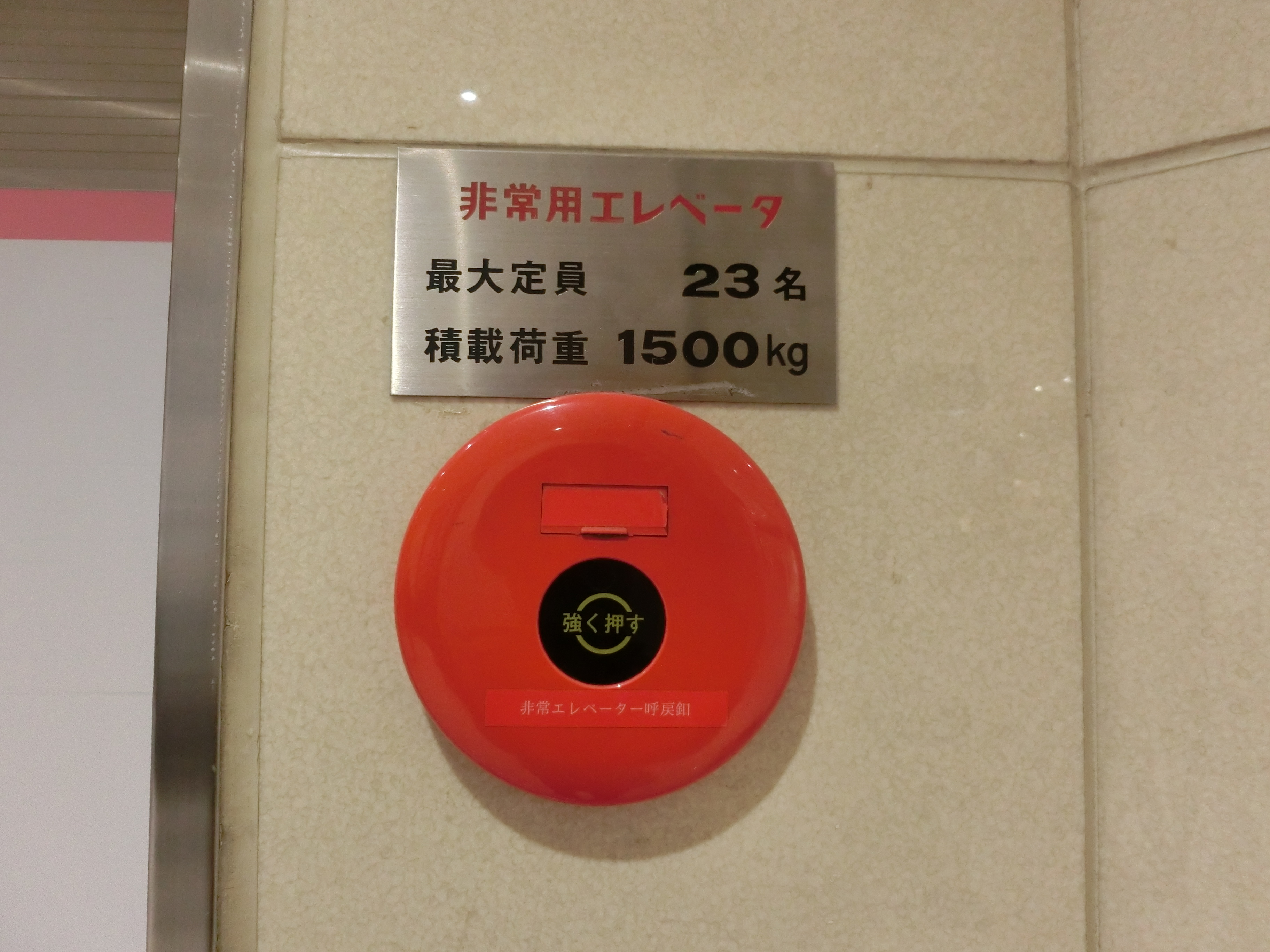 東急百貨店吉祥寺店1階にて撮影。